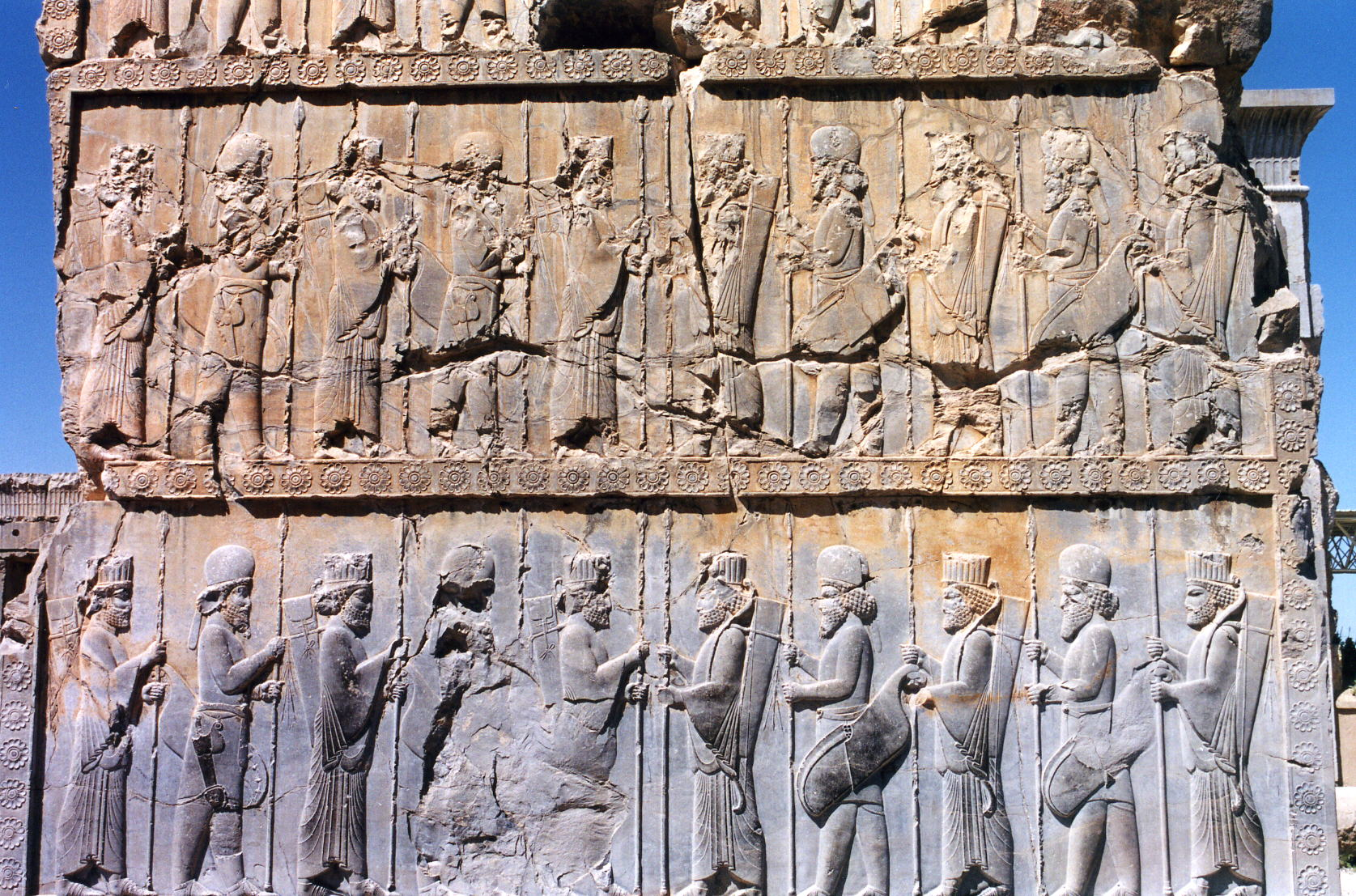 Persépolis (Iran). La Garde du Grand Roi. VIe-Ve s. av. J.-C. Photo Ginolerhino 2002.